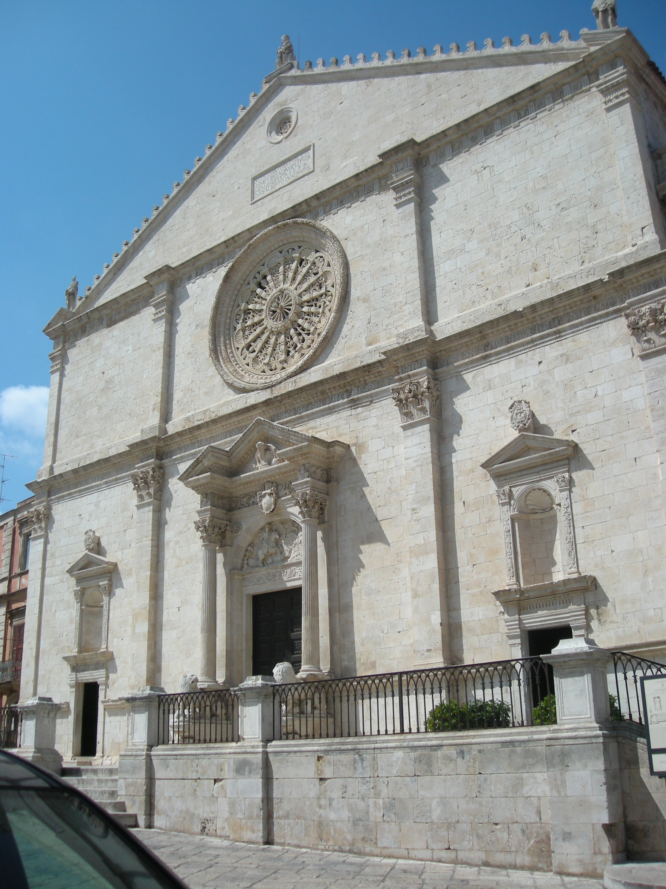 Cattedrale di Acquaviva delle Fonti (prov. Bari)